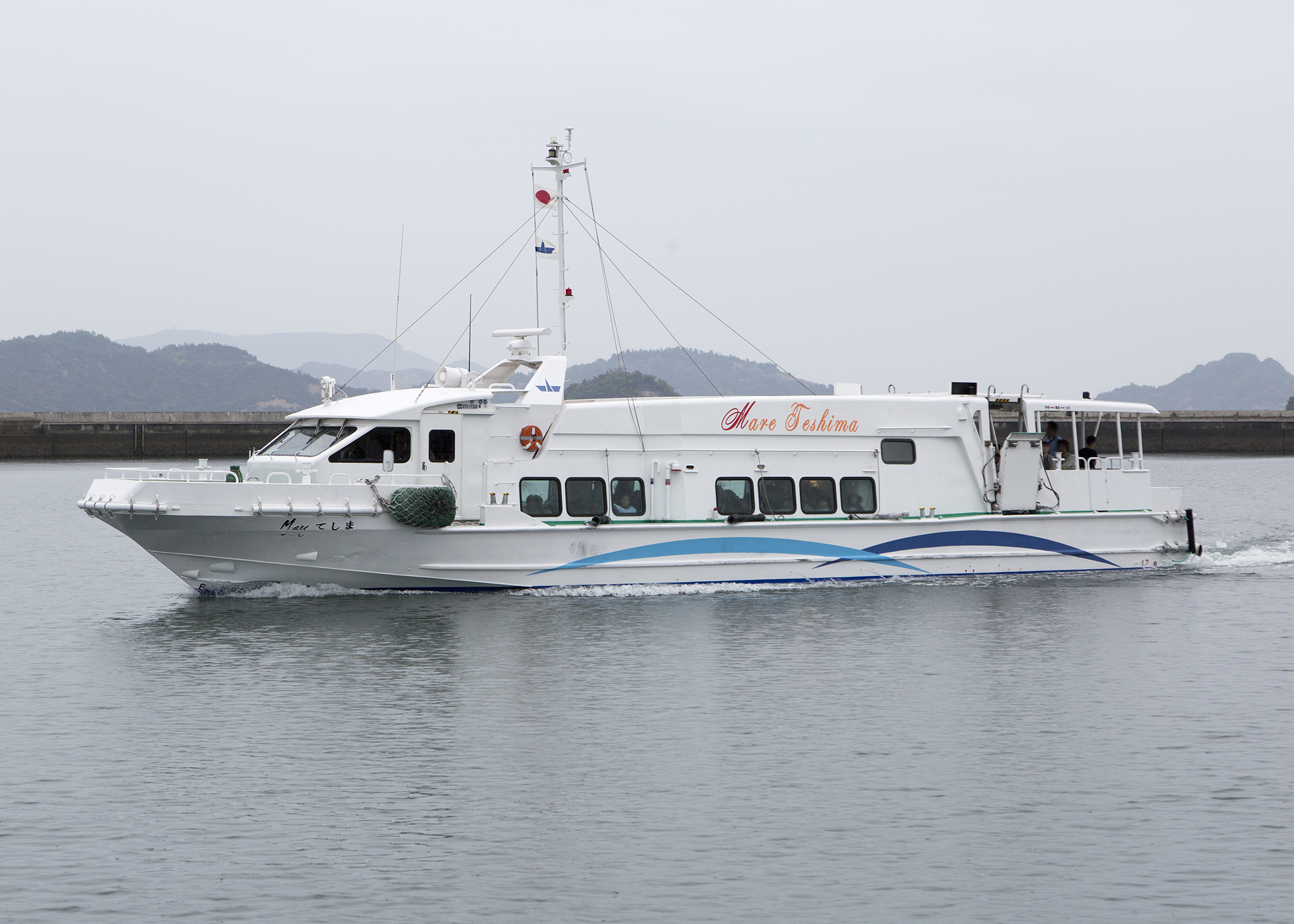 小豆島豊島フェリー マーレてしま 宇野港にて